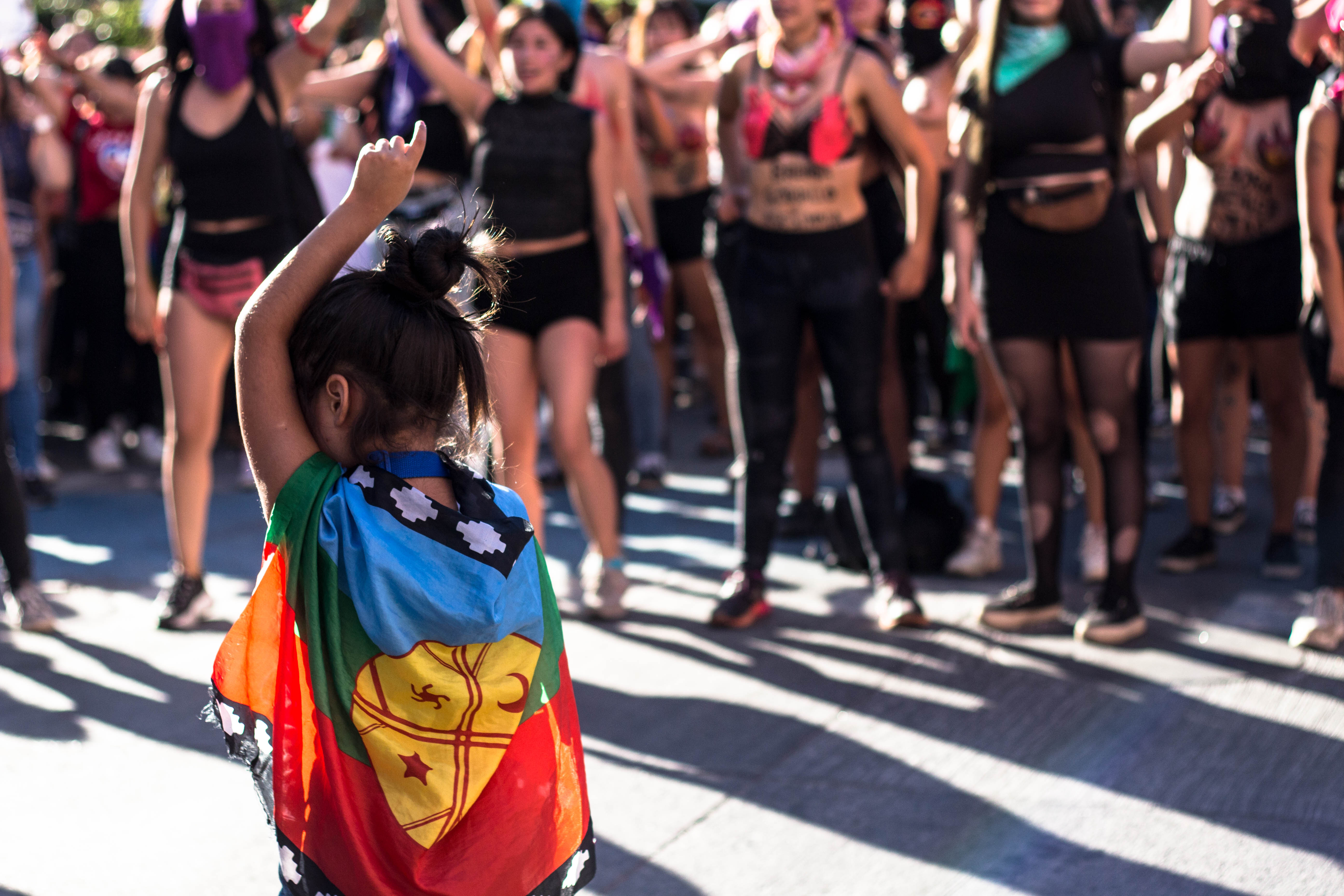 Marcha por el día de la mujer. Concepción llamó a convocatoria masiva el Lunes 9M en conmemoración del 8M a nivel mundial. Una pequeña se unió a uno de los grupos de cuerpas pintadas y mientras se recordaba la viralizada intervención "un violador en tu camino" fue foco de atención por su expresión de rabia y admiración por sus raíces.